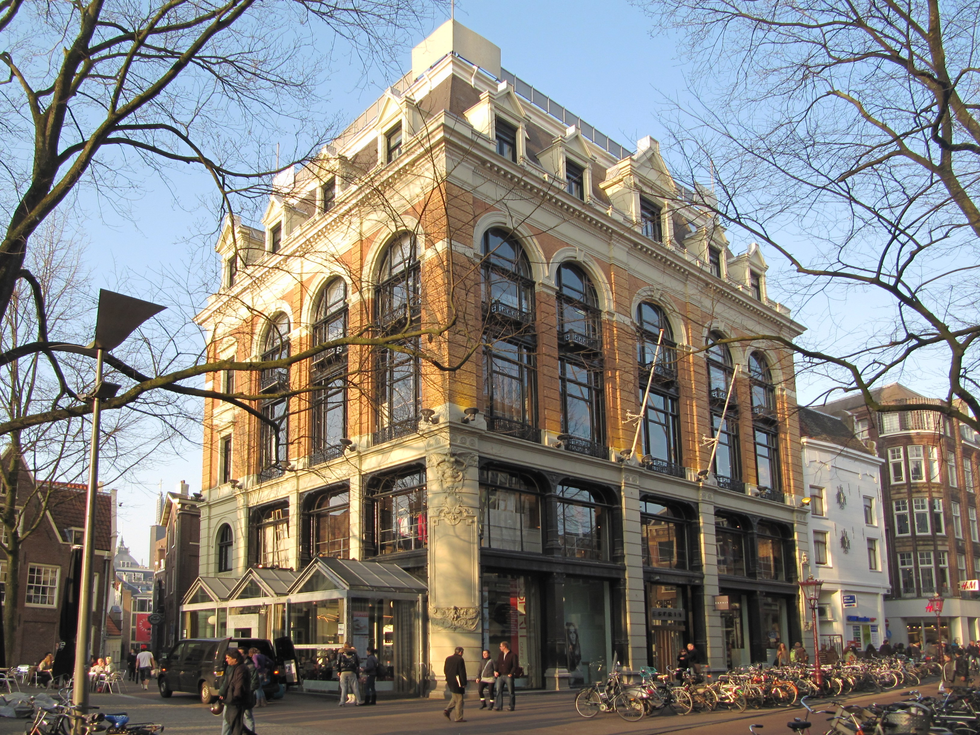 RM518462 Spui 10.jpg